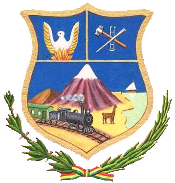 Escudo_Oruro.jpg